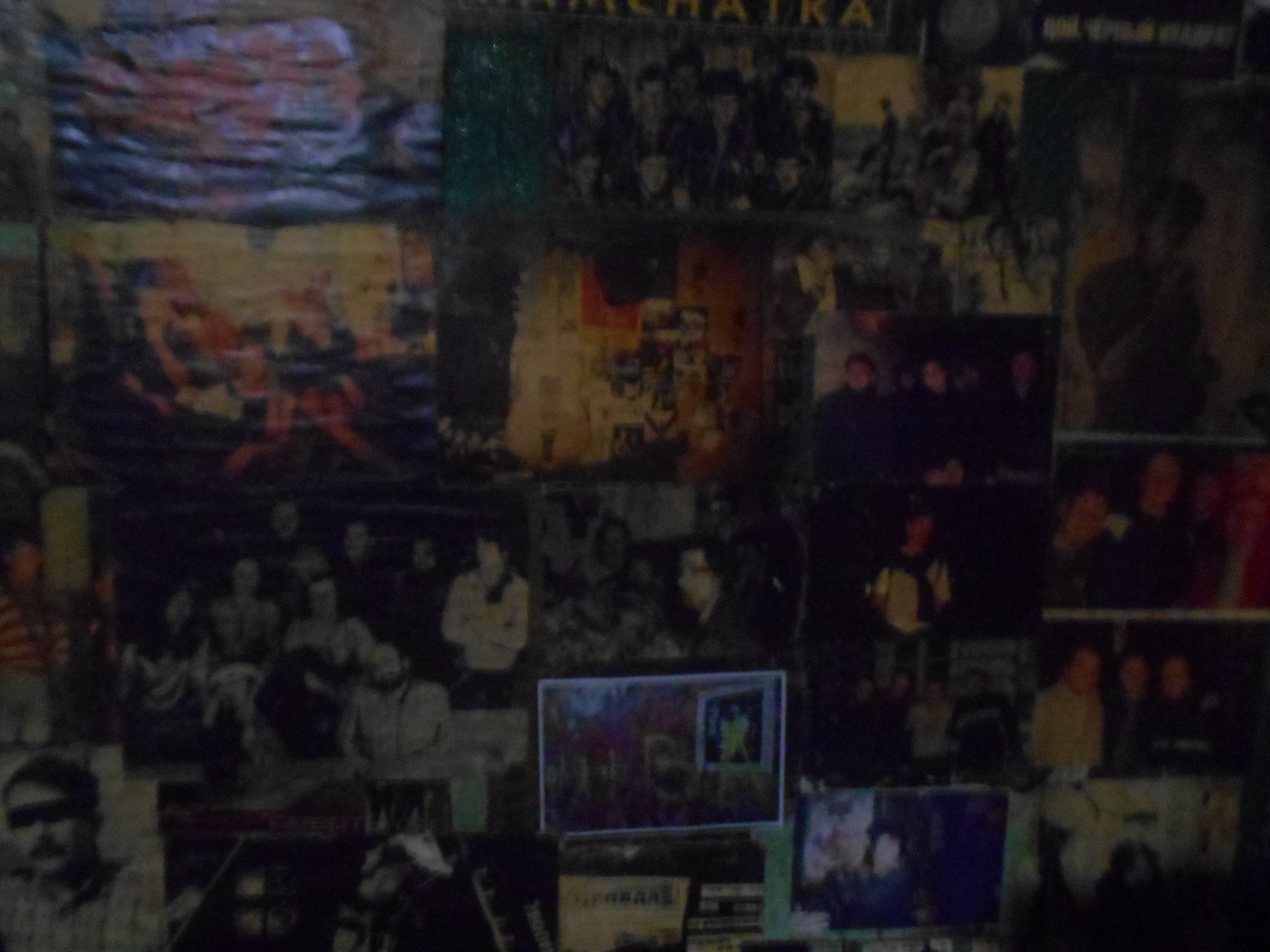 Котельная